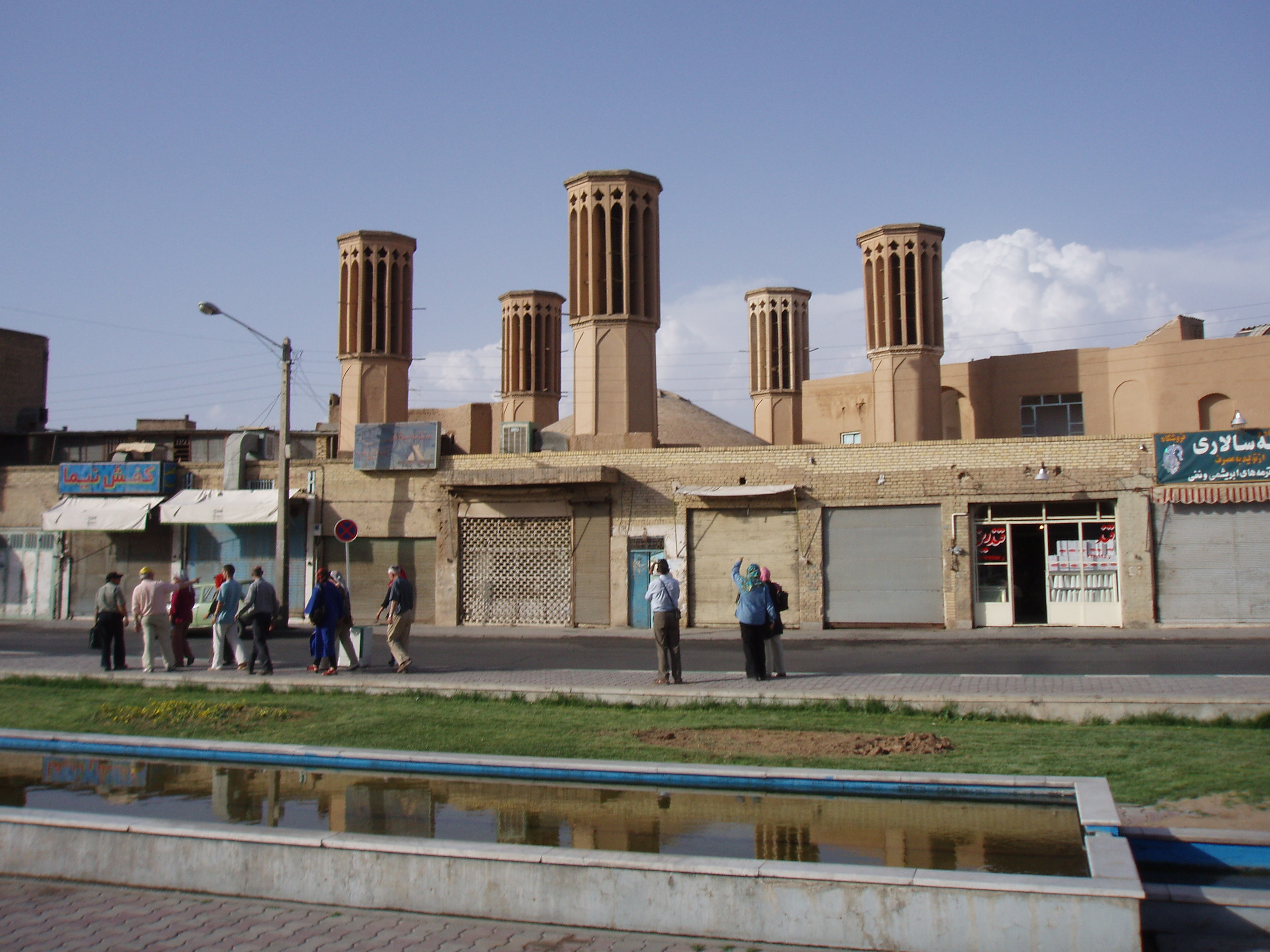 Gym with windtowers